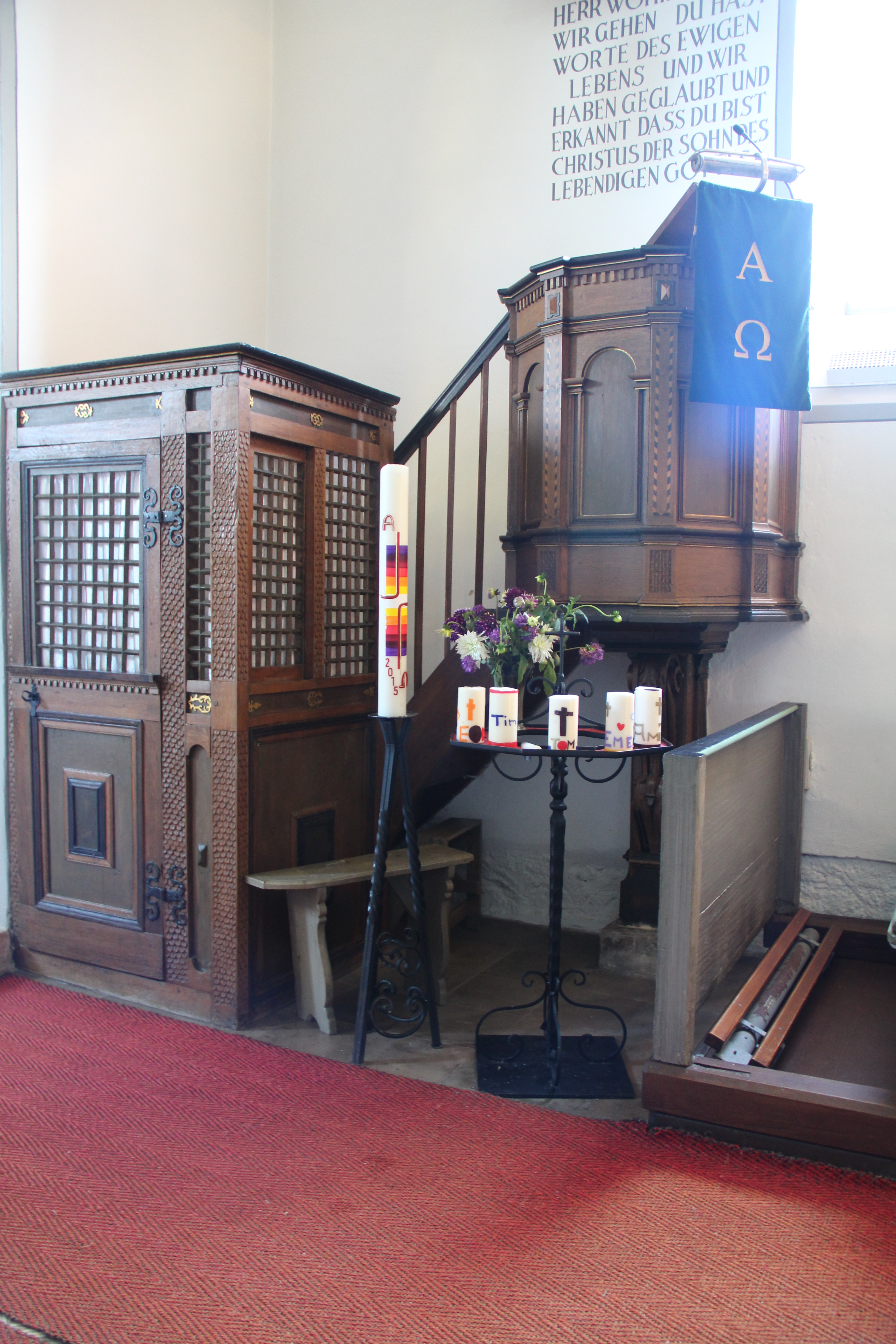 Oberwalgern